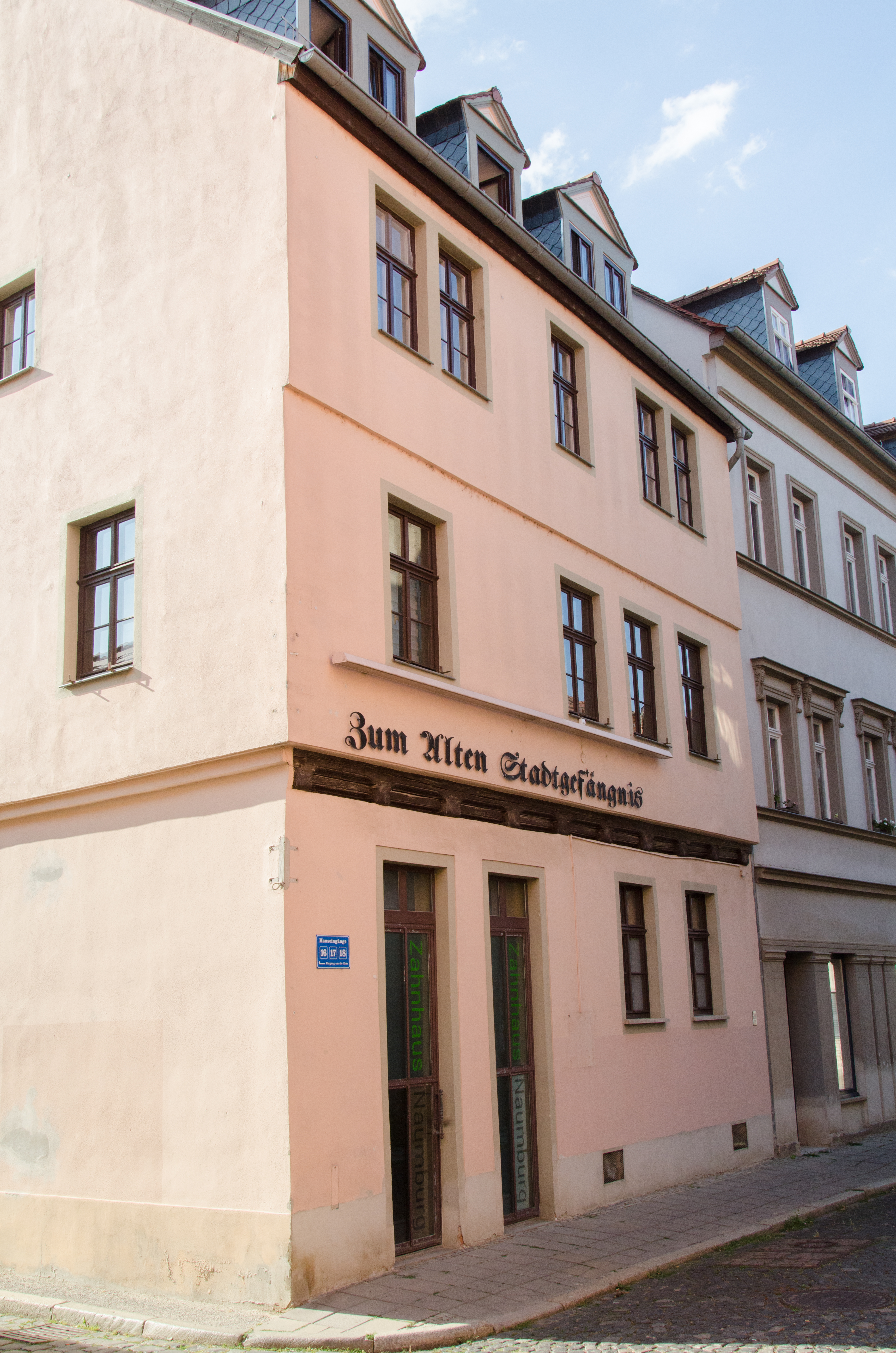 Naumburg, Mühlgasse 18